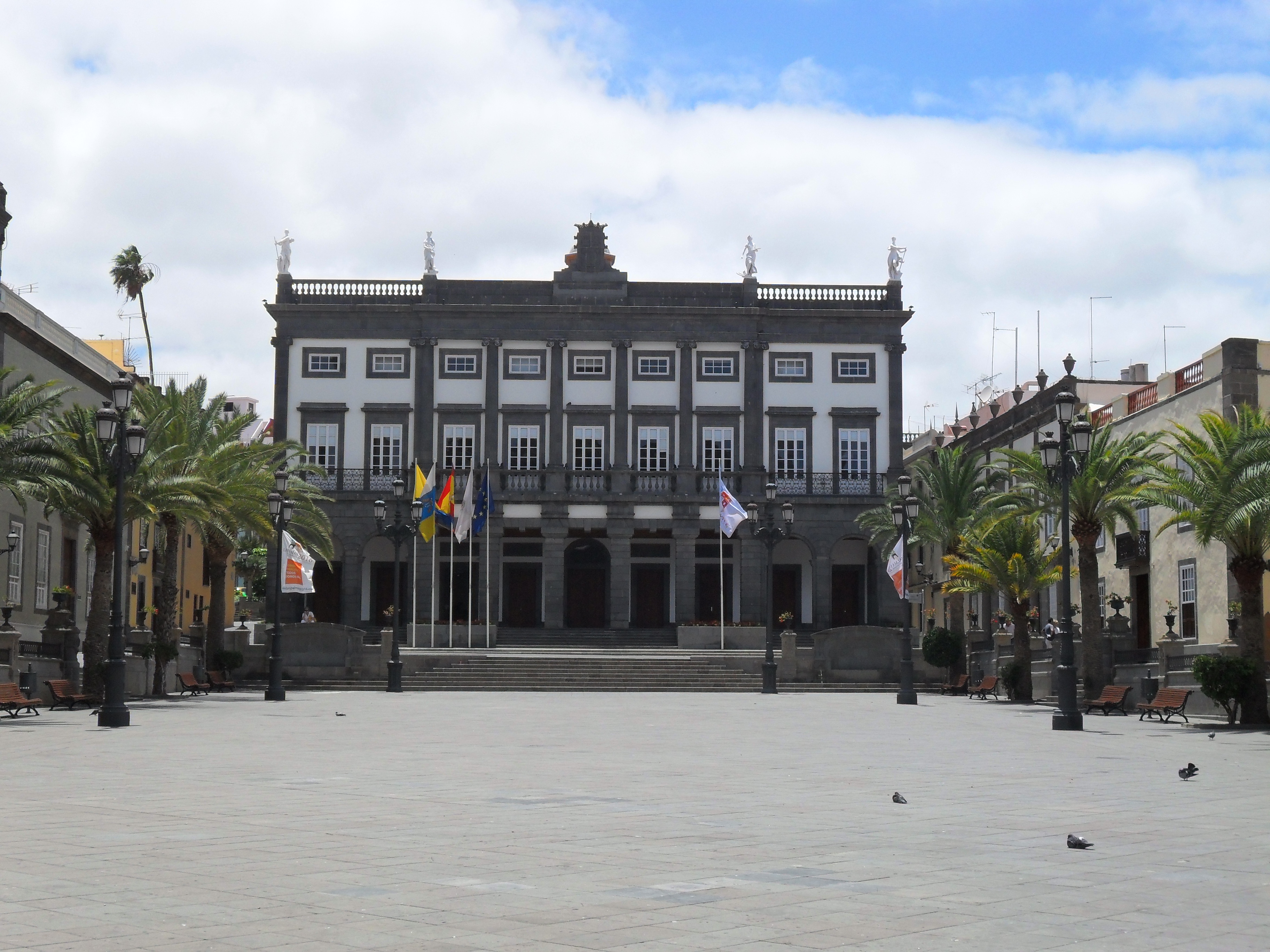 Plaza mayor de santa ana